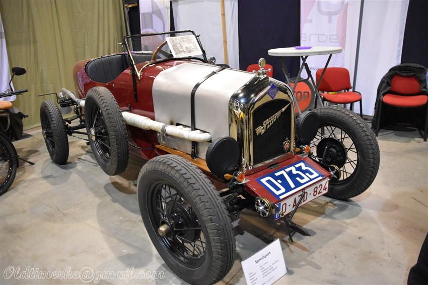 Speedsport type PE course 1925